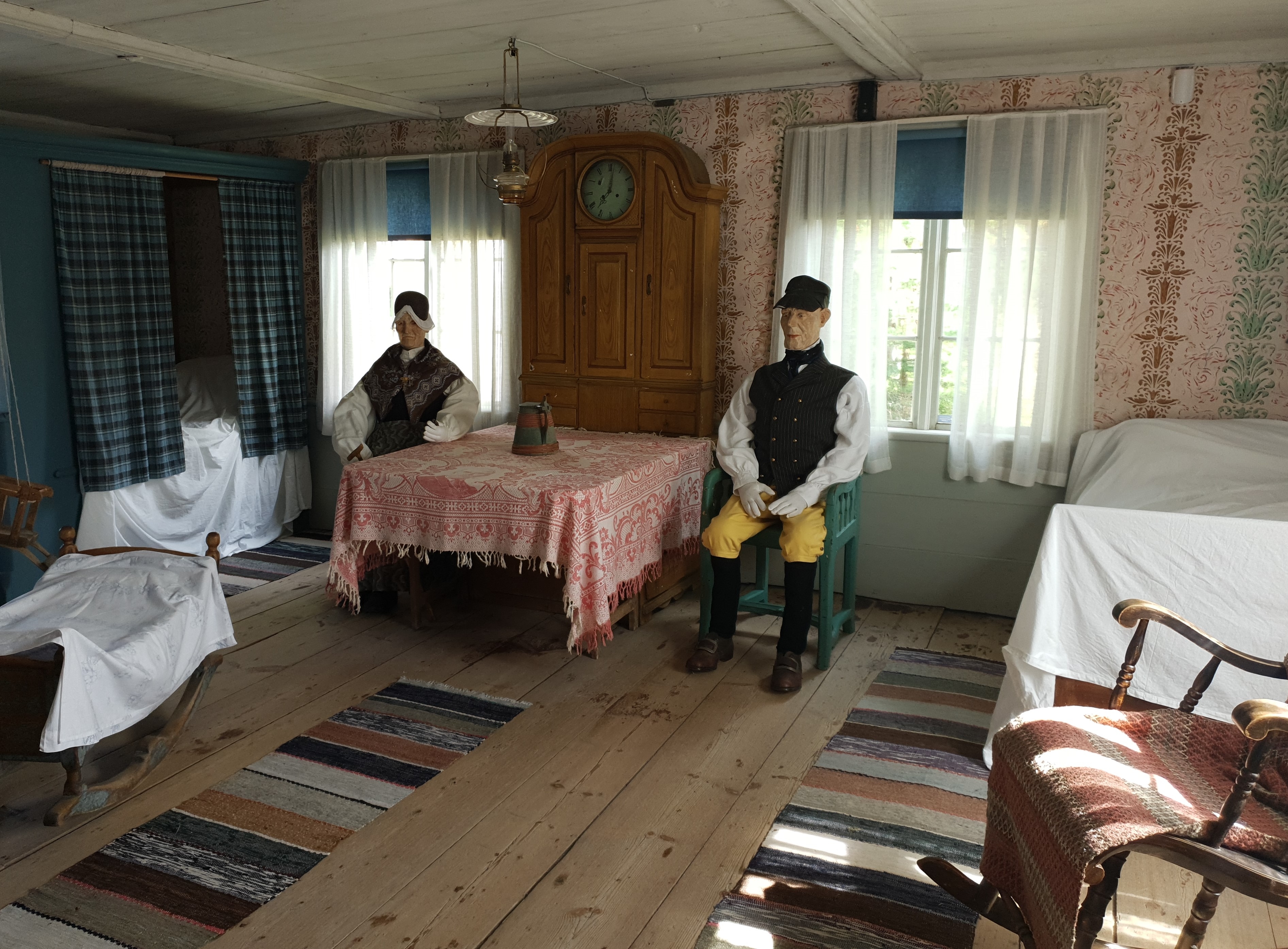 Arbrådräkter på dockor i naturlig storlek utställda i Häggbyggingen Arbrå Fornhem. Dräkterna är gjorda av Julius Forsman från Flästa. Väggmålningarna tros vara utförda av Anders Åsberg.